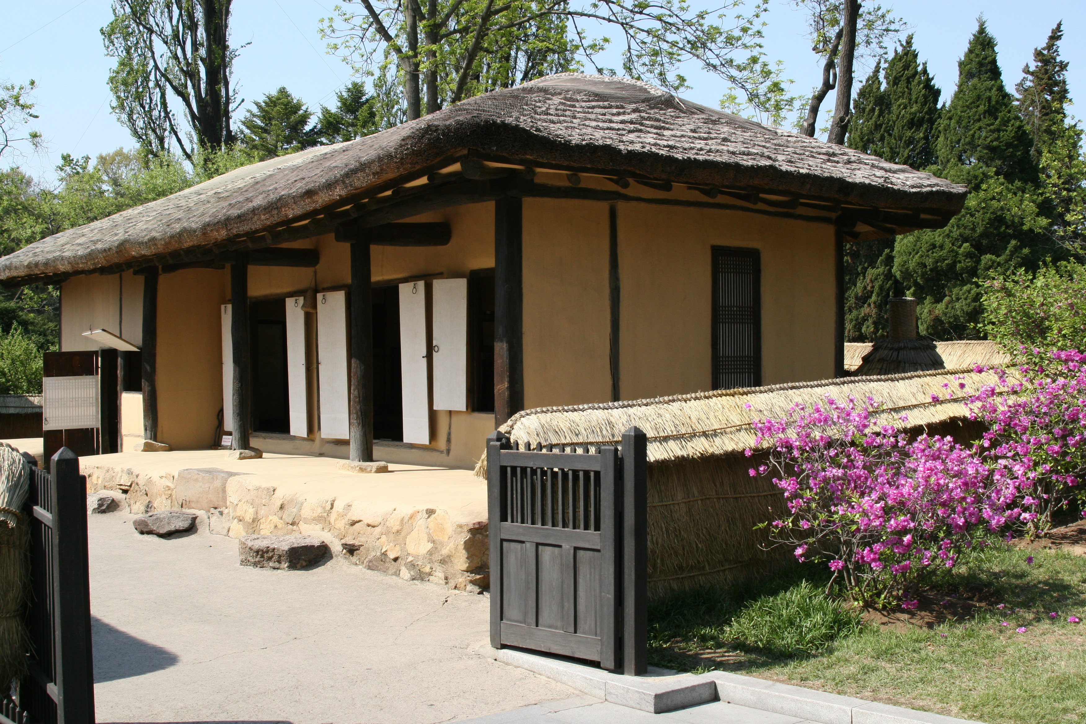 Kim Il Song's birthplace - Mangyongdae.